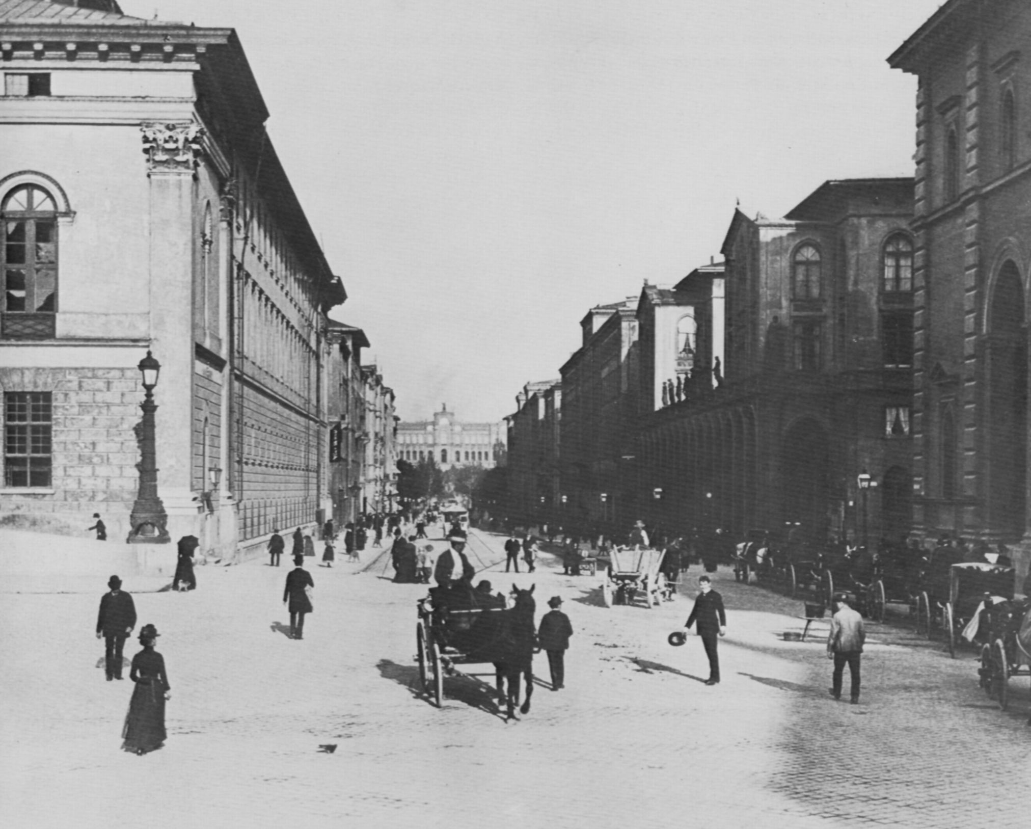 Originale Bildunterschrift: Münchens vornehmstes Viertel kurz vor der Jahrhundertwende: die Maximilianstraße mit der Oper, dem Hotel »Vier Jahreszeiten«, dem Maximilianeum und der Pferdebahn.